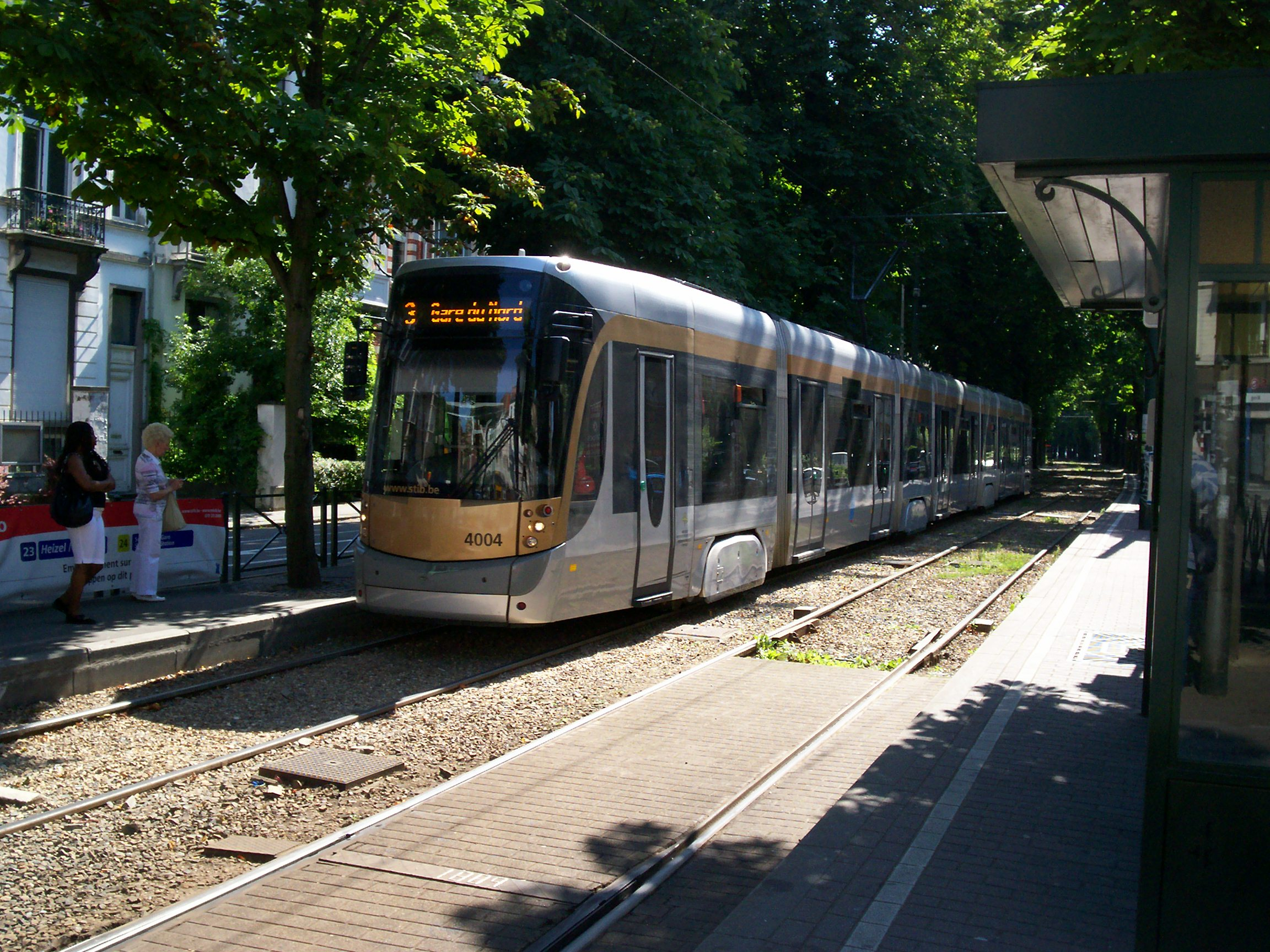 T 4000 à Vanderkindere, assurant une mission sur la ligne 3 en direction de la Gare du Nord